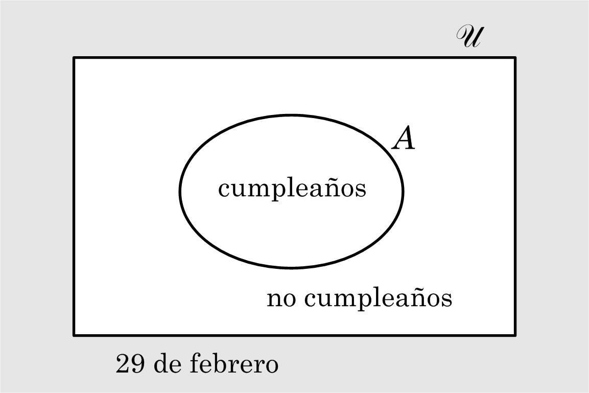 El problema de Humpty Dumpty - Juan José Luetich